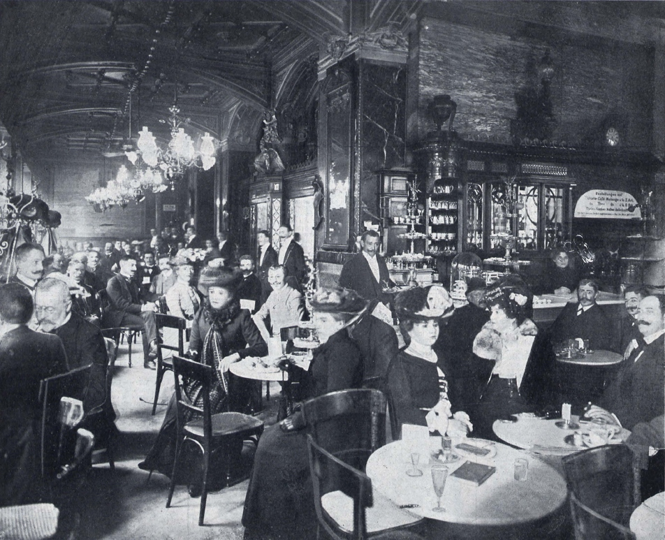 Innenansicht des Berliner Victoria-Cafés, 1902.